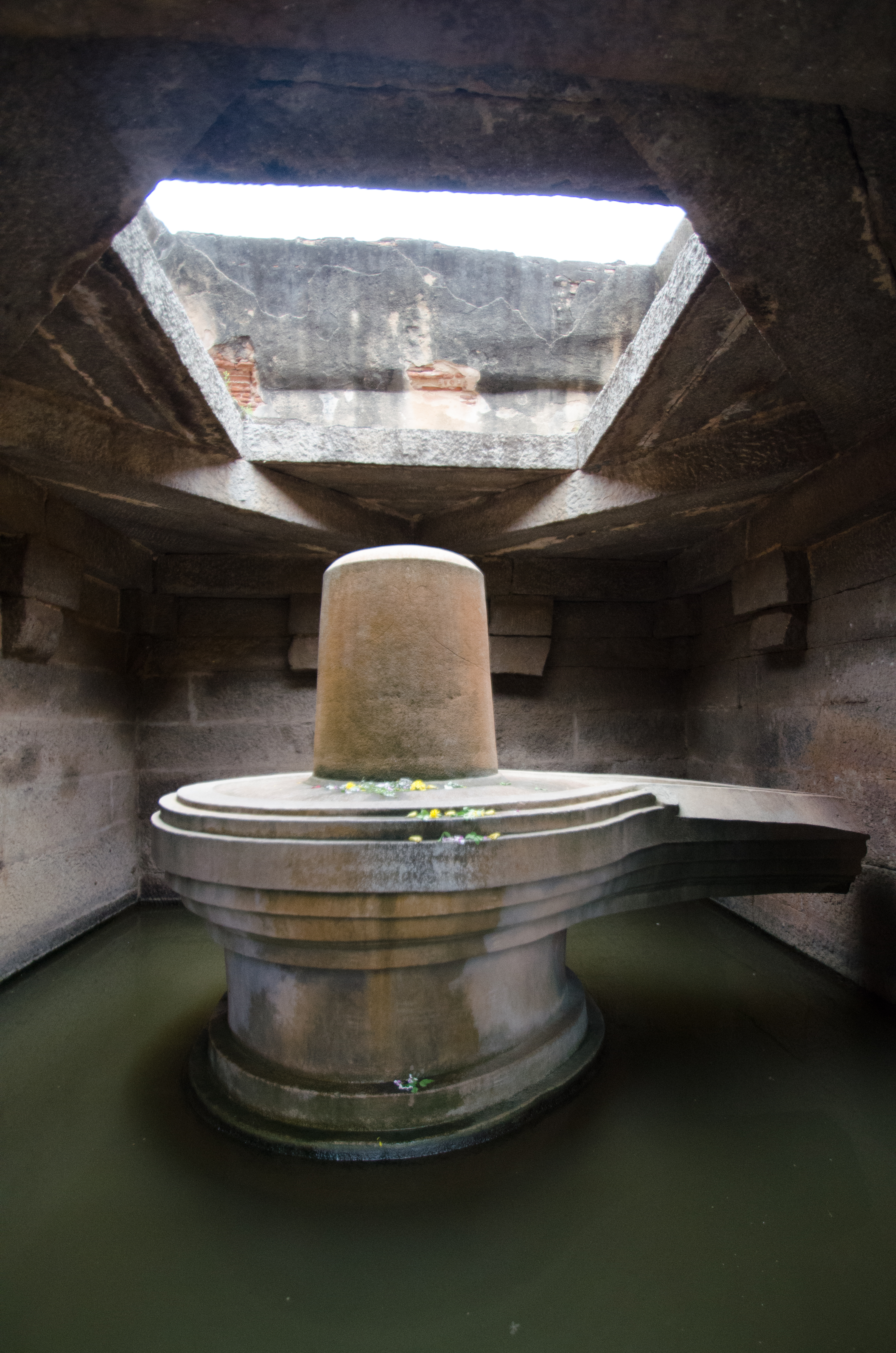 Badavilinga Temple